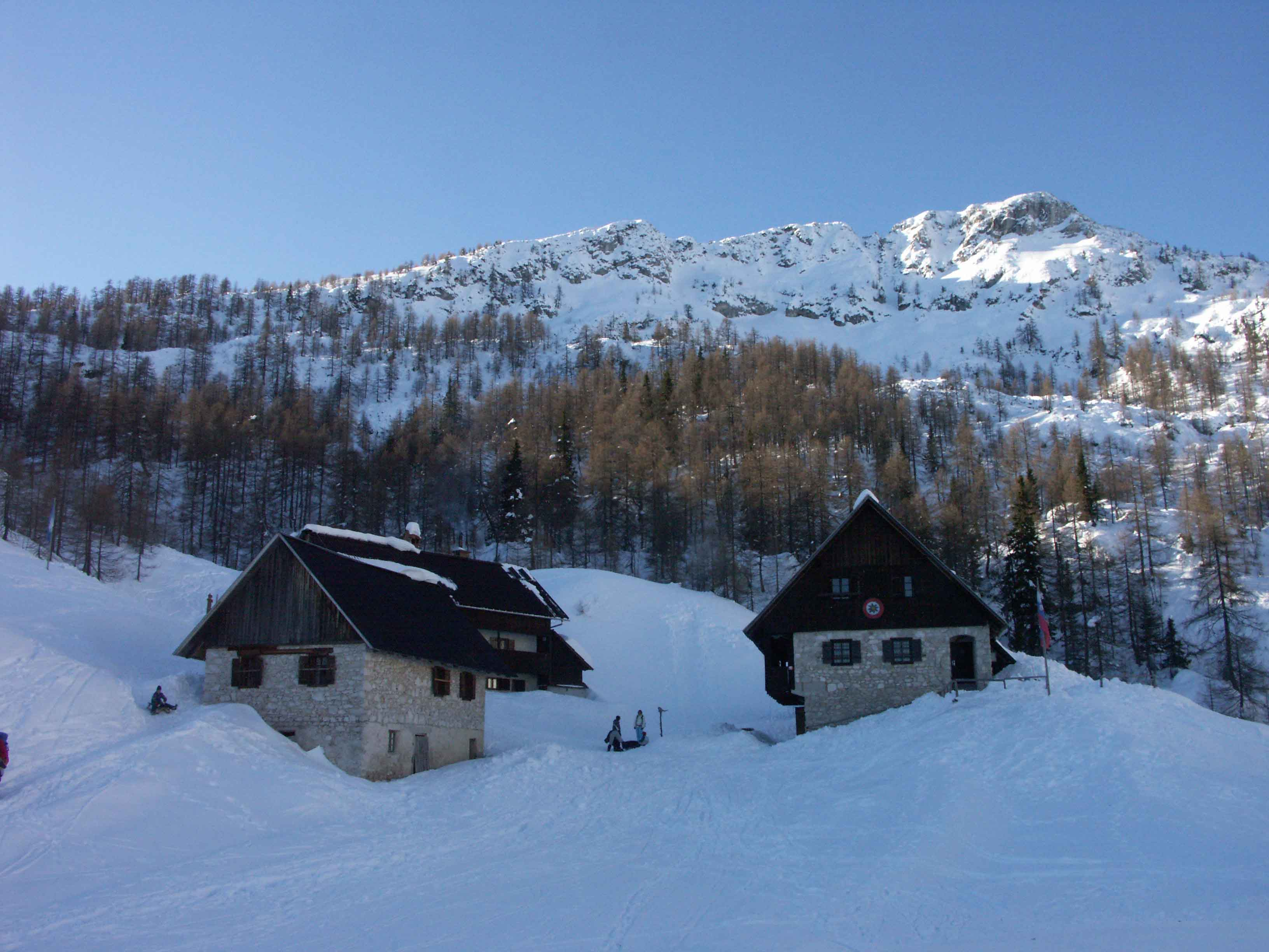 Blejska Koča, alpine hut in Slovenia photo:Ziga 12:24, 12 April 2007 (UTC)